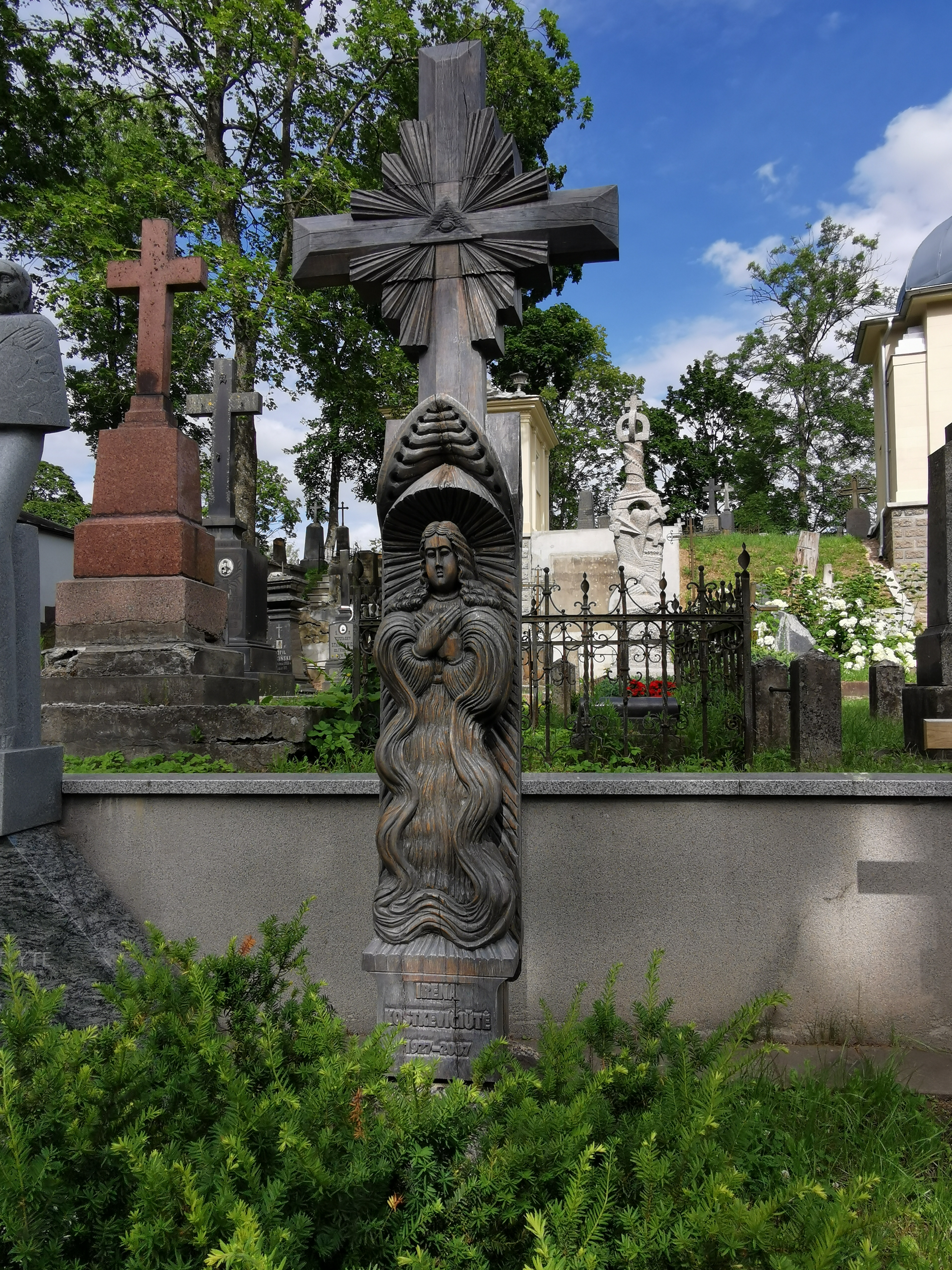 Irenos Kostkevičiūtės antkapis. Irena Kostkevičiūtė (1927 m. rugsėjo 17 d. – 2007 m. liepos 20 d. Vilnius) – Lietuvos literatūros ir meno tyrinėtoja. humanitarinių mokslų daktarė.